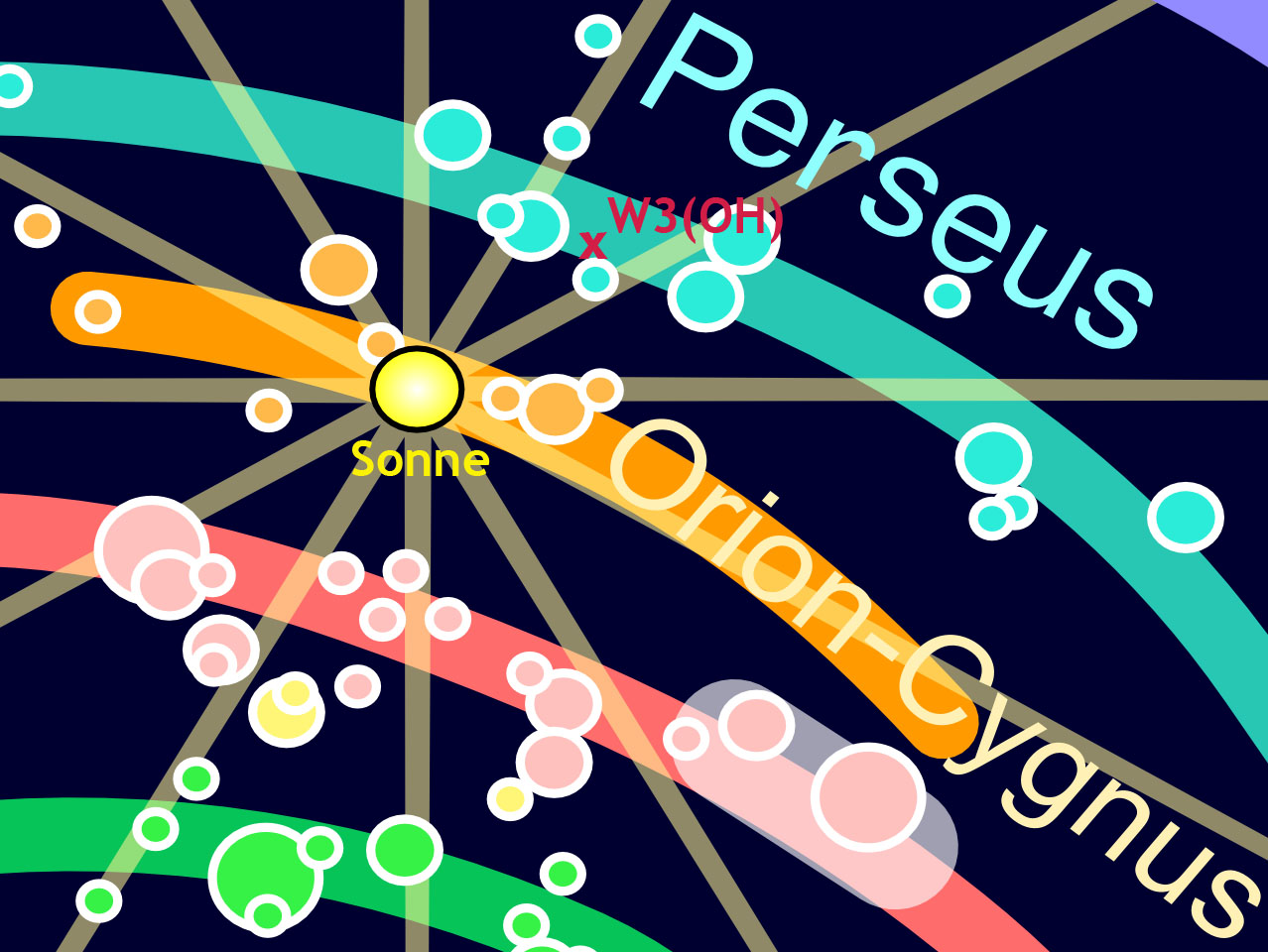 Sternentstehungsgebiet W3OH relativ zum Sonnenstandort